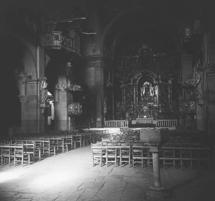 Vista de l ' altar major de l'església parroquial i arxiprestal de Santa Maria de Moià .